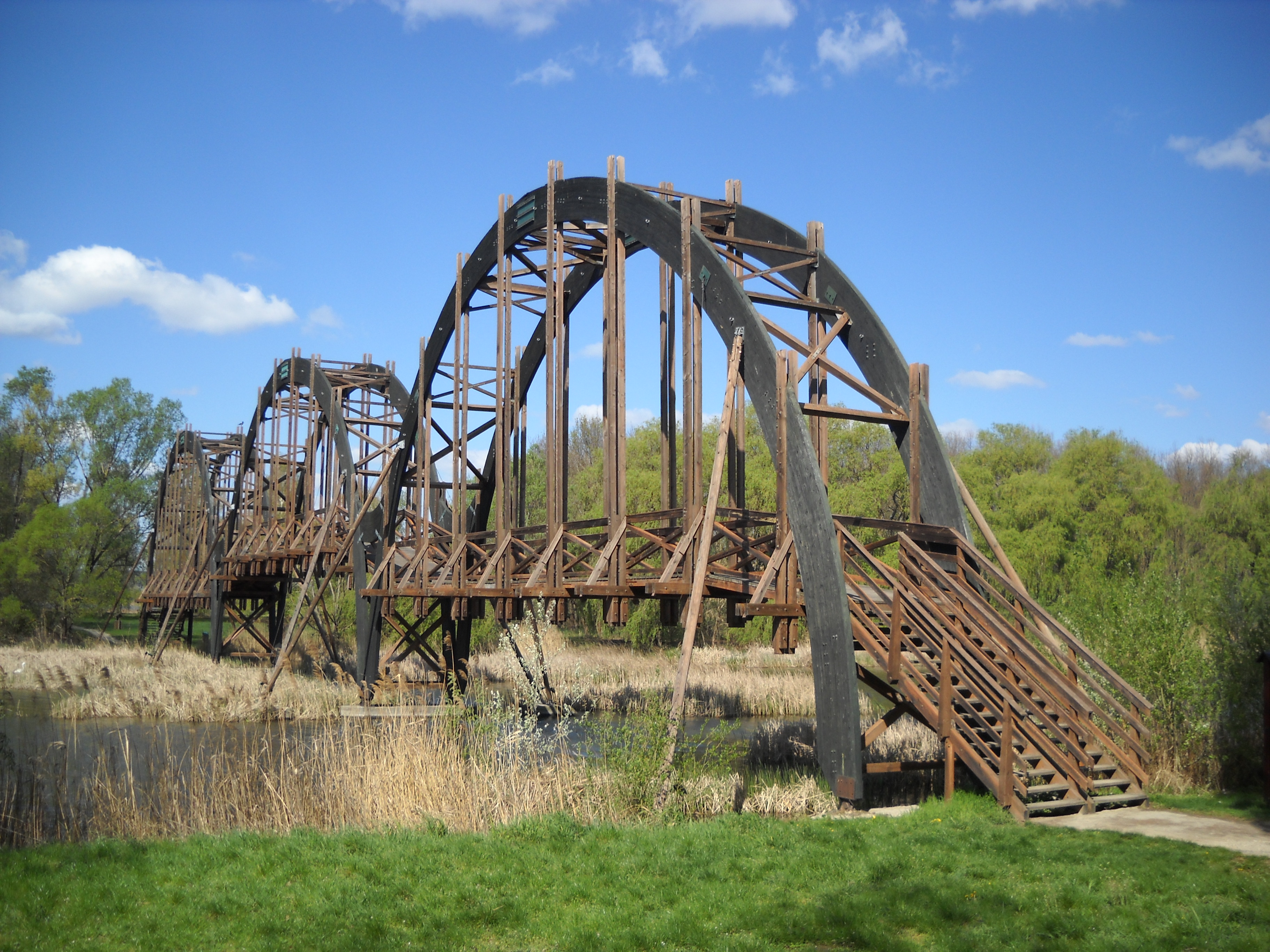 Kányavári híd a Kis-Balatonnál (bridge "Kányavári" at Kis-Balaton)